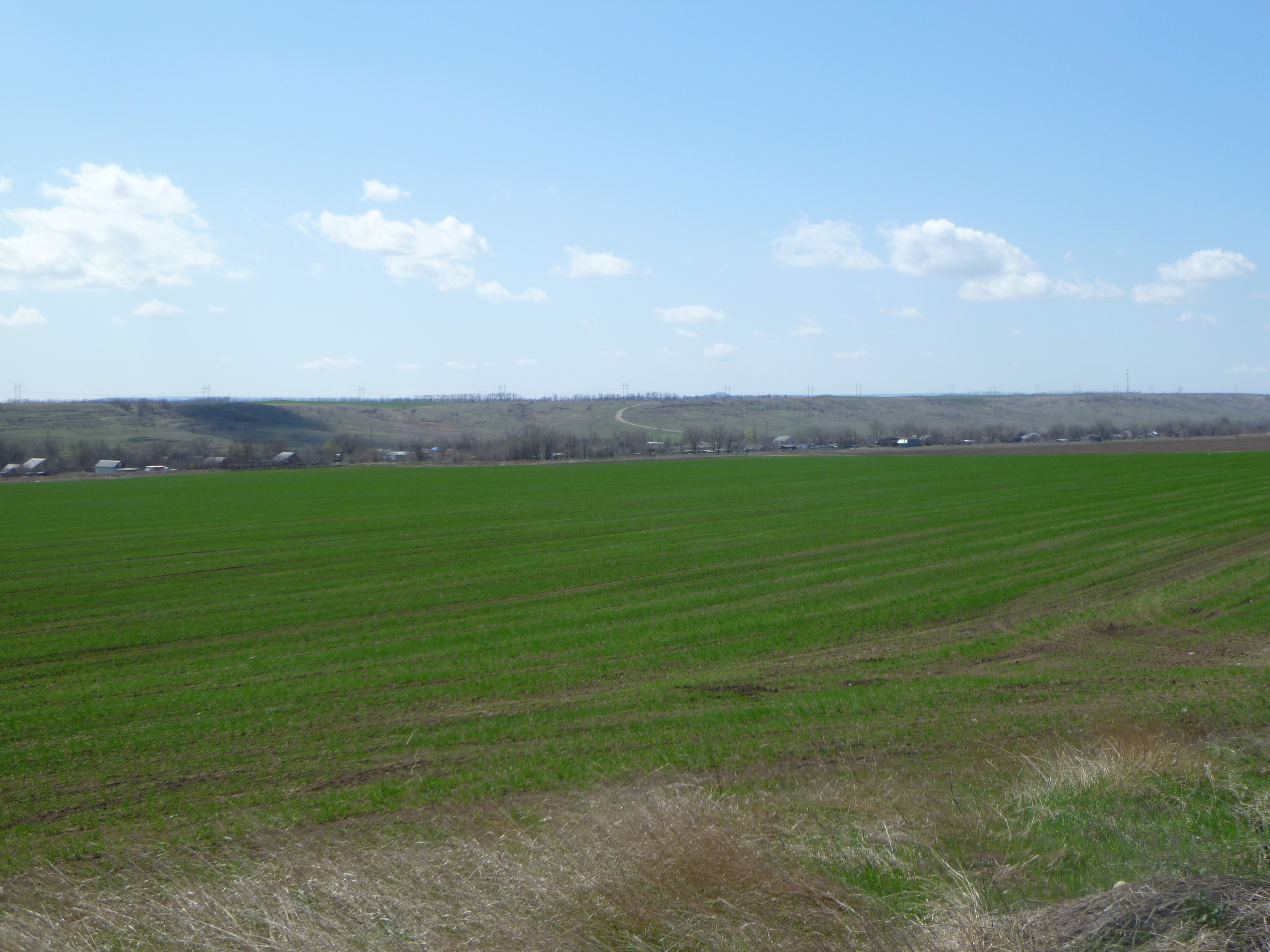 село Старомарьевка